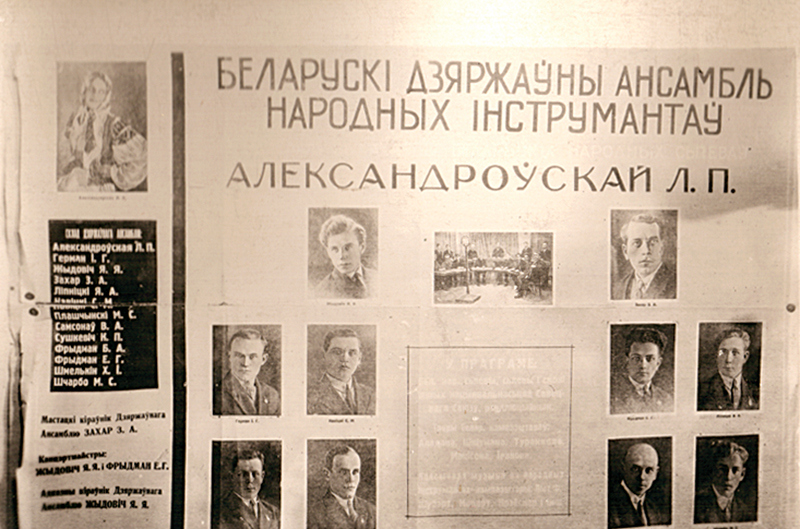 Плакат Беларускага дзяржаўнага ансамбля народных інструментаў Александроўскай Л. П. 1931 года